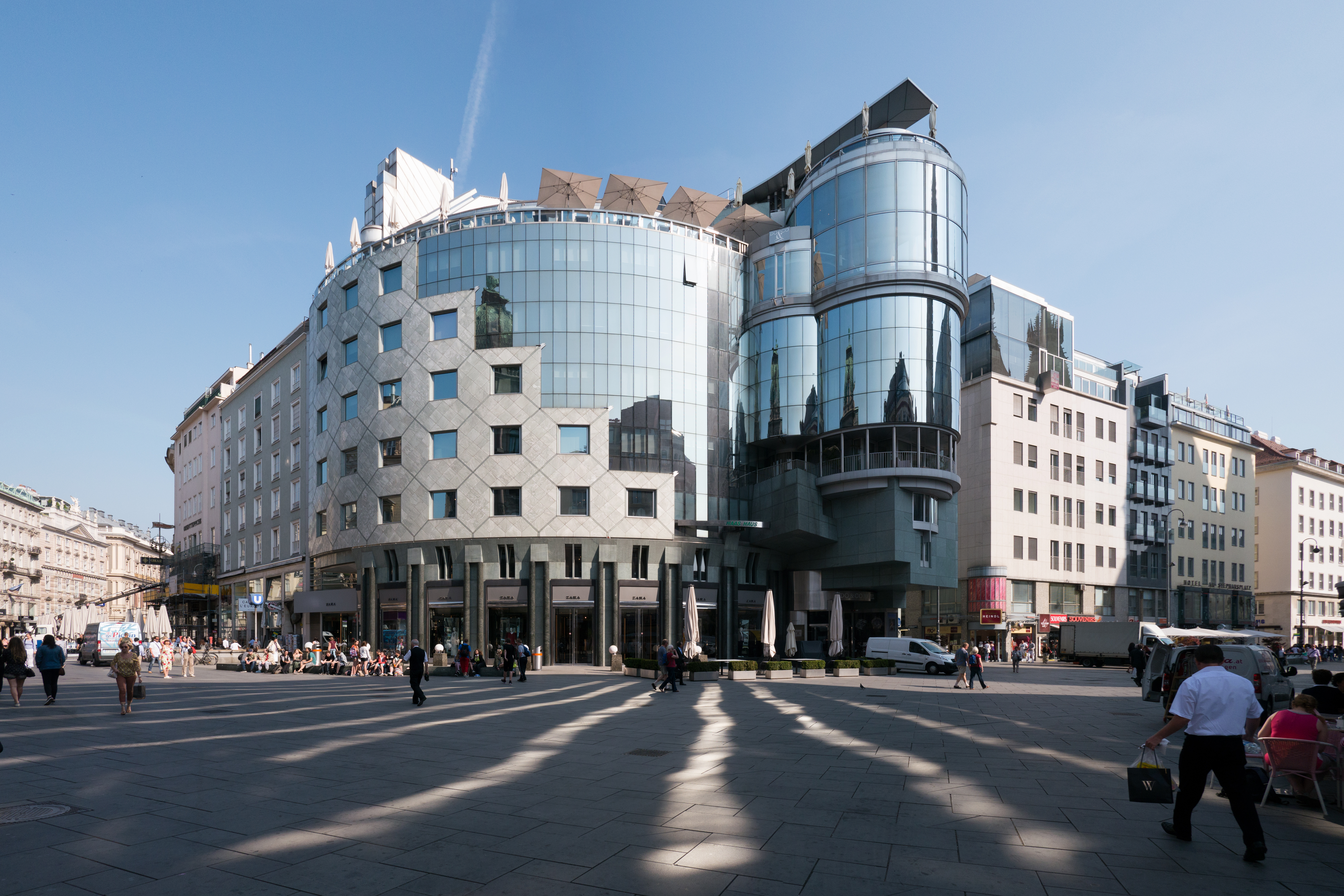 Haashaus